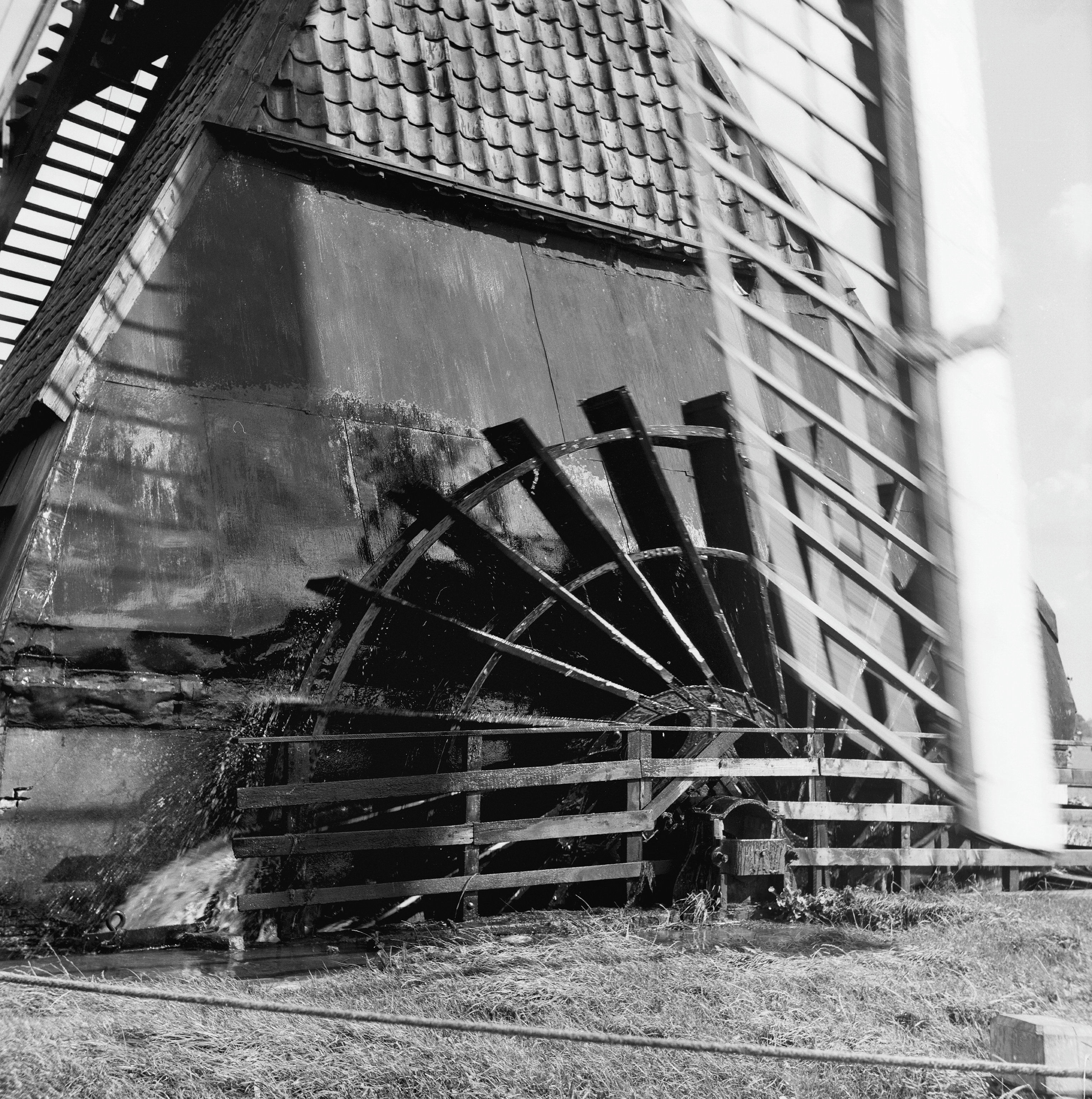 Molens: wipmolen van de Blokweer, deel van de polder Alblasserdam